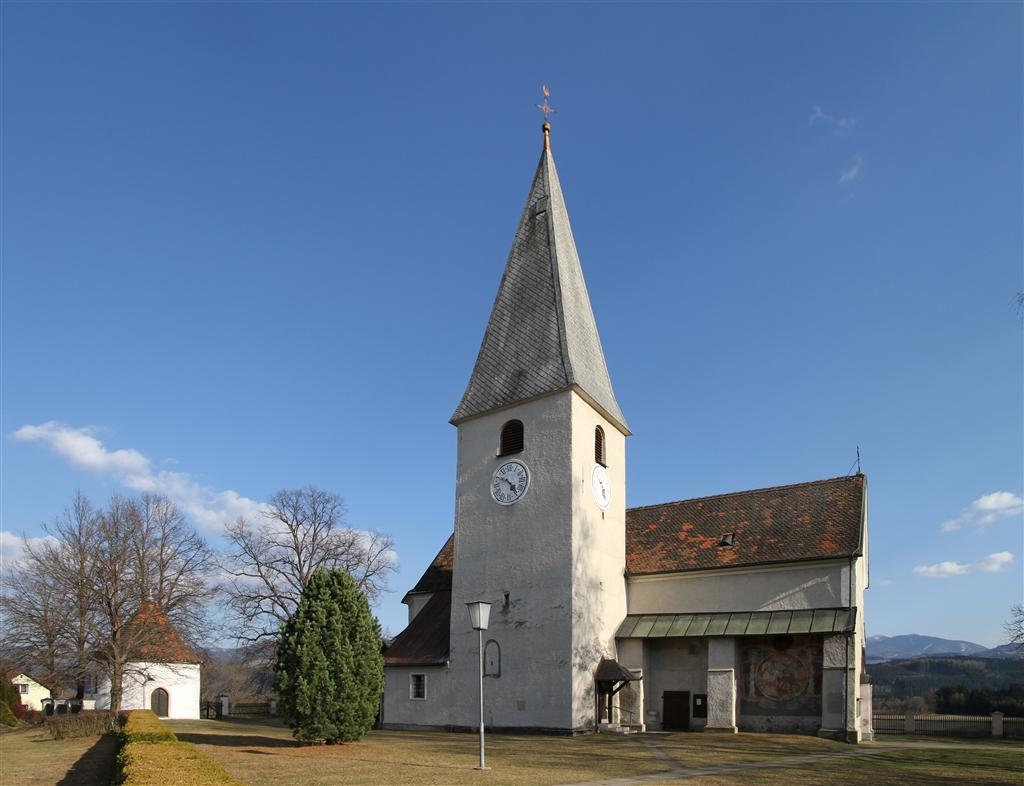 Kath. Pfarrkirche hl. Martin